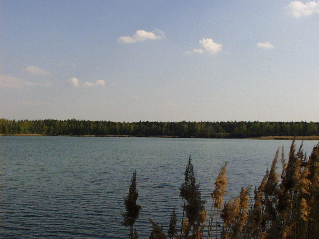 Ferdinandsteich Schwarzheide, Deutschland.